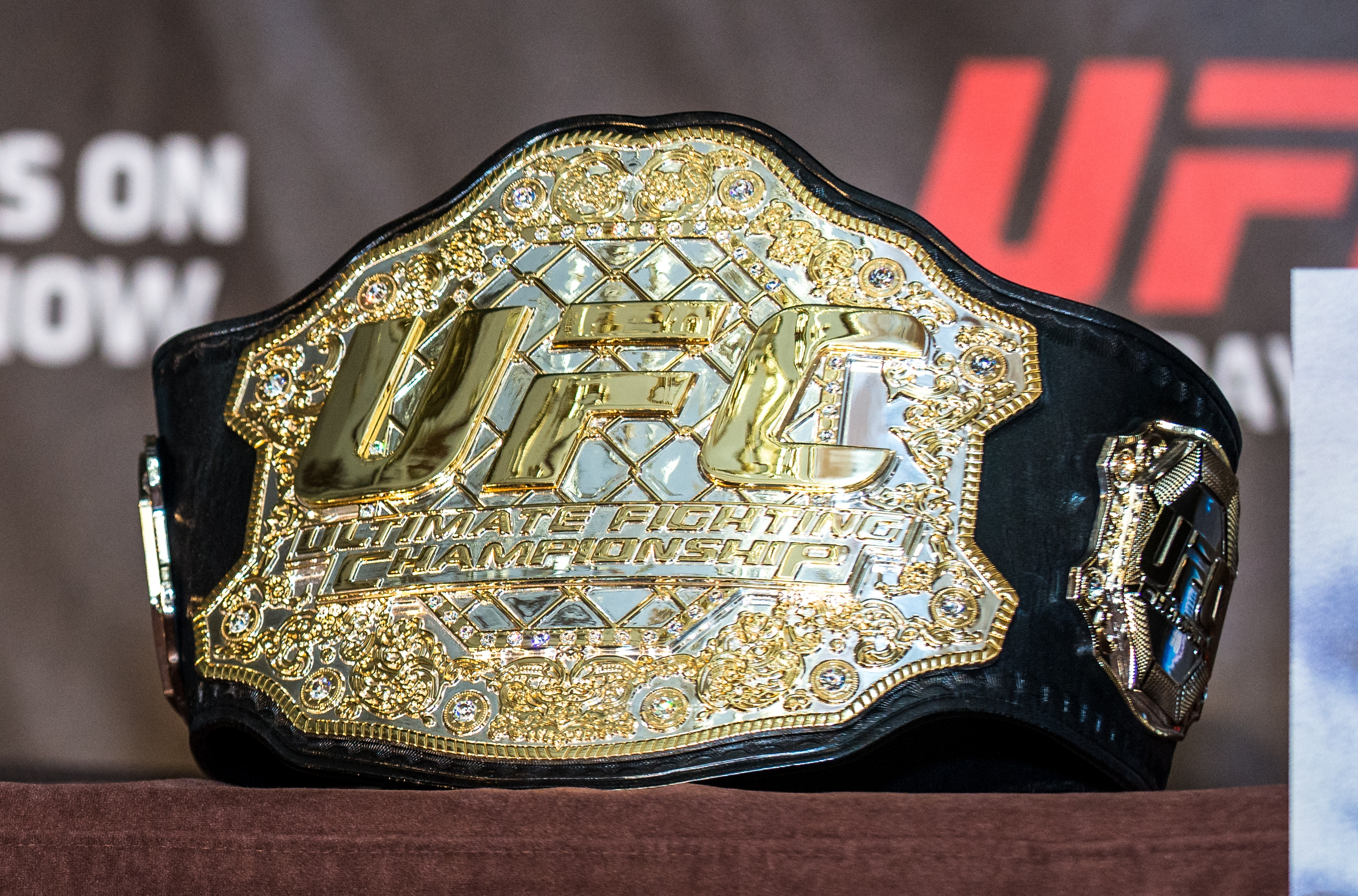 חגורת אליפות של ה-UFC